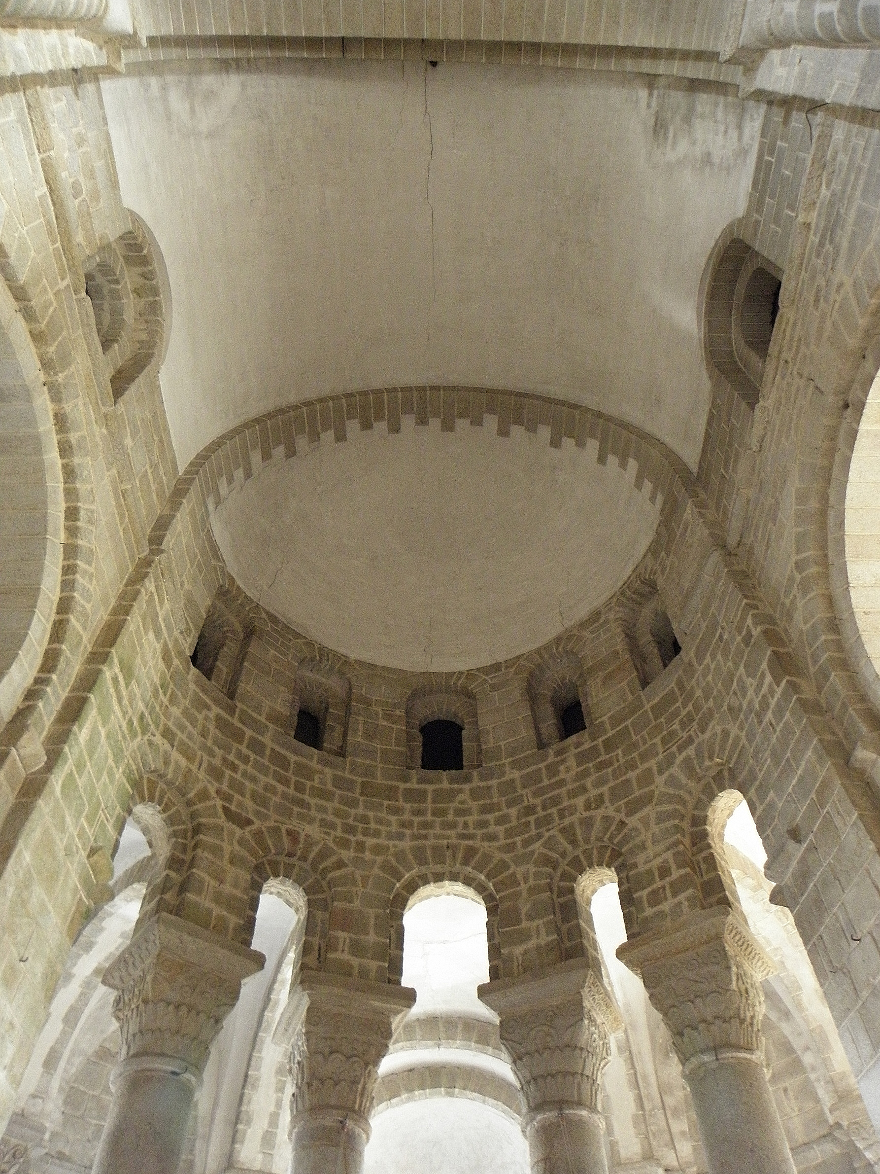 Chœur de l'église Saint-Tudy de Loctudy -29). .